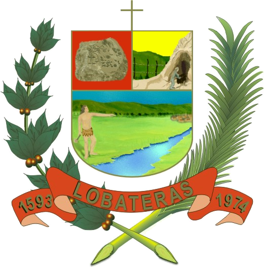 Escudo del municipio Lobatera, estado Táchira, Venezuela